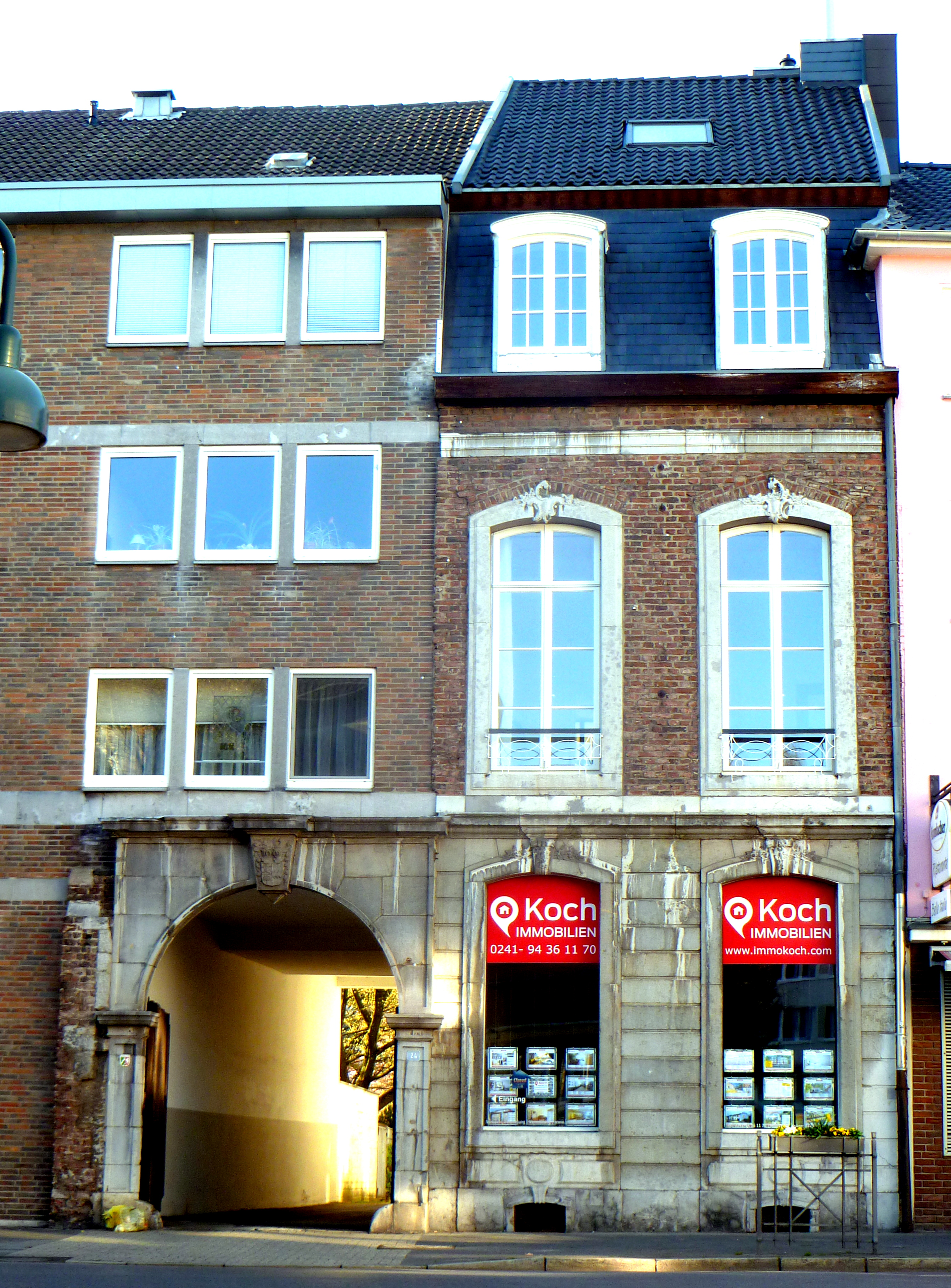 Haus zum Horn Aachen, Jakobstraße 24, Baudenkmal in Aachen